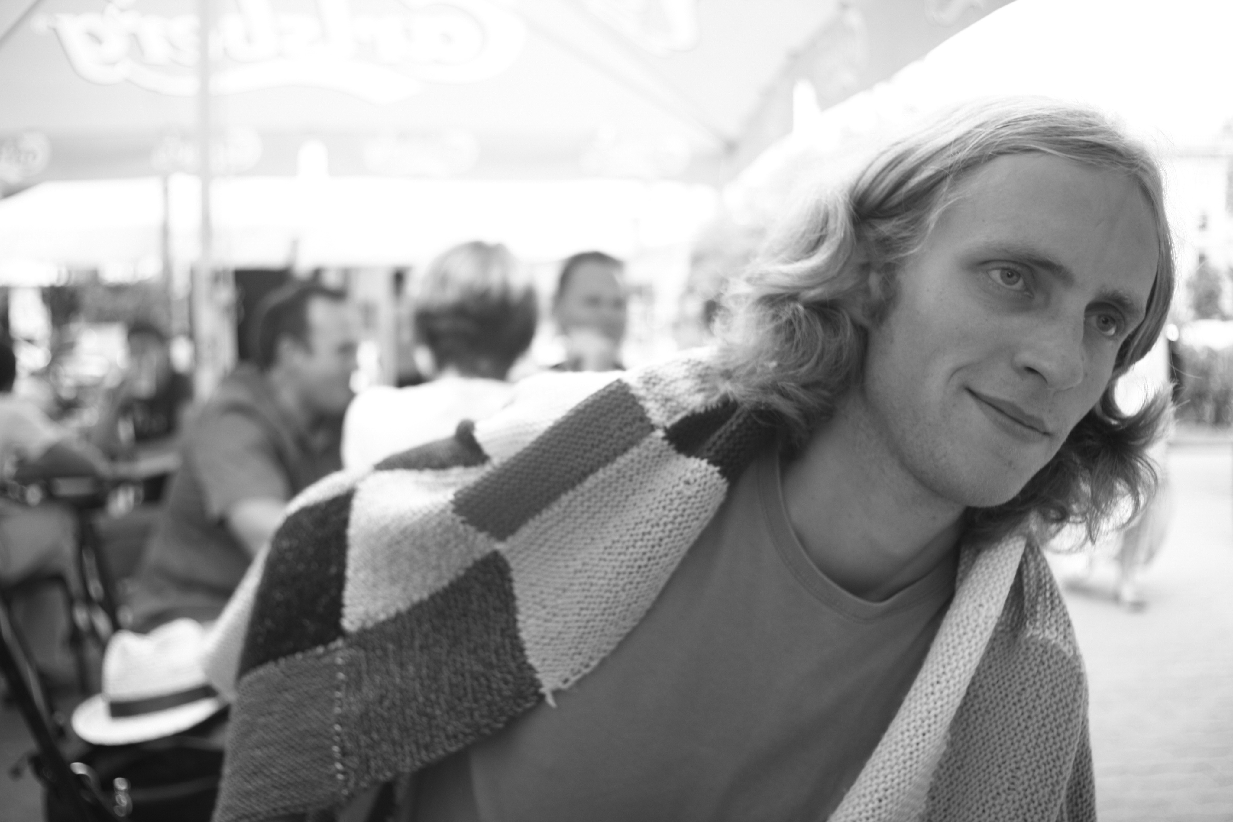 Іван Кулінський